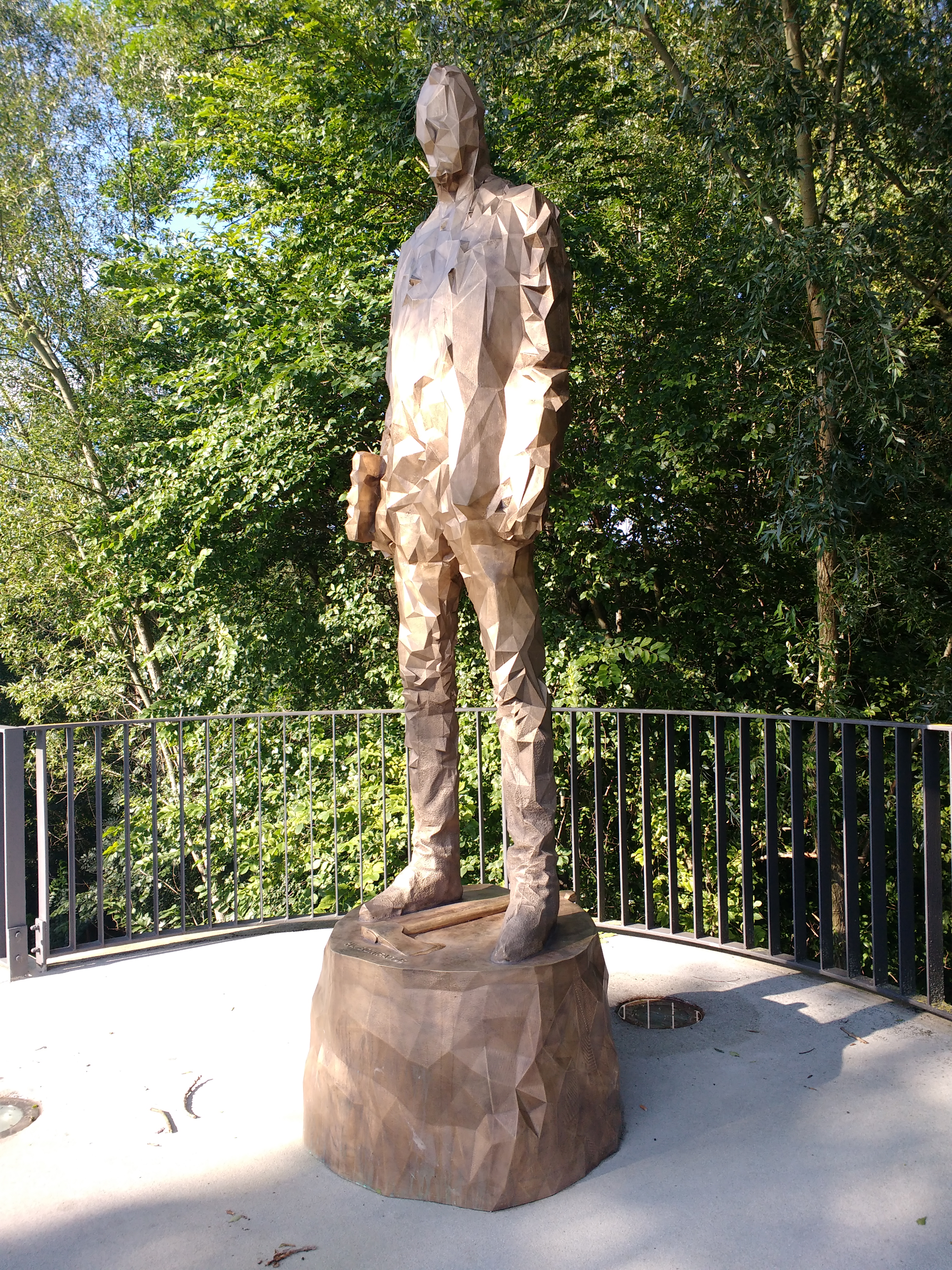 Statue des Bonifatius Korbinianbrücke in Freising